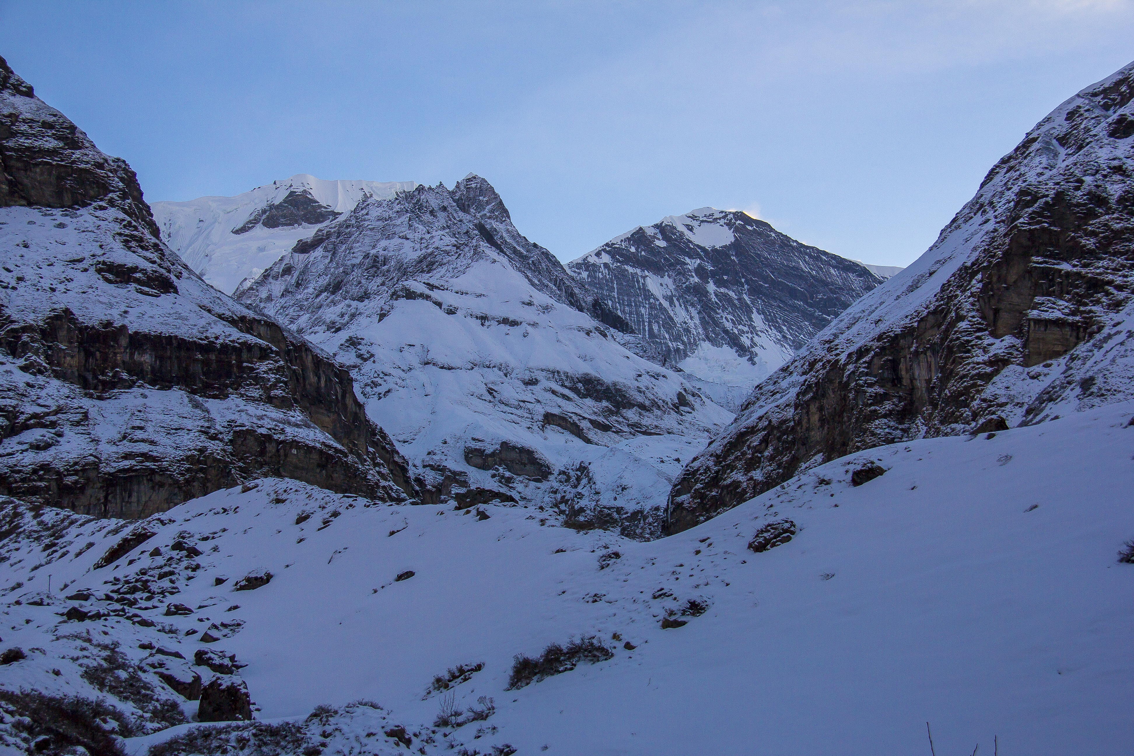 नेपाली: माछापुच्छ्रे अाधार शिविरको उत्तरतर्फ देखिएको हिम-श्रिङ्खला।